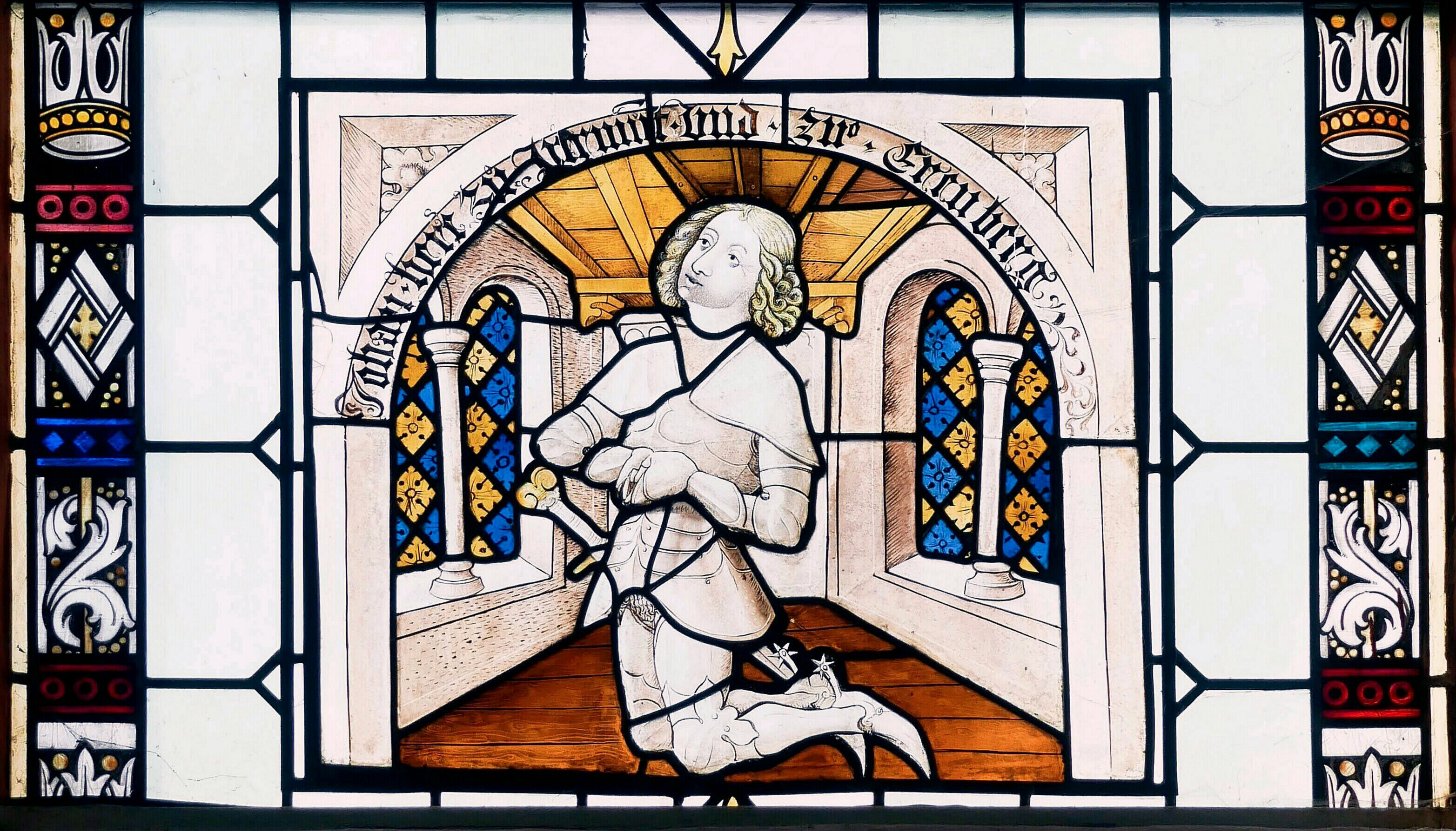 Spätgotische Glasmalerei in der Pfarrkirche St. Luzia in Löf (Mosel), 15. Jahrhundert